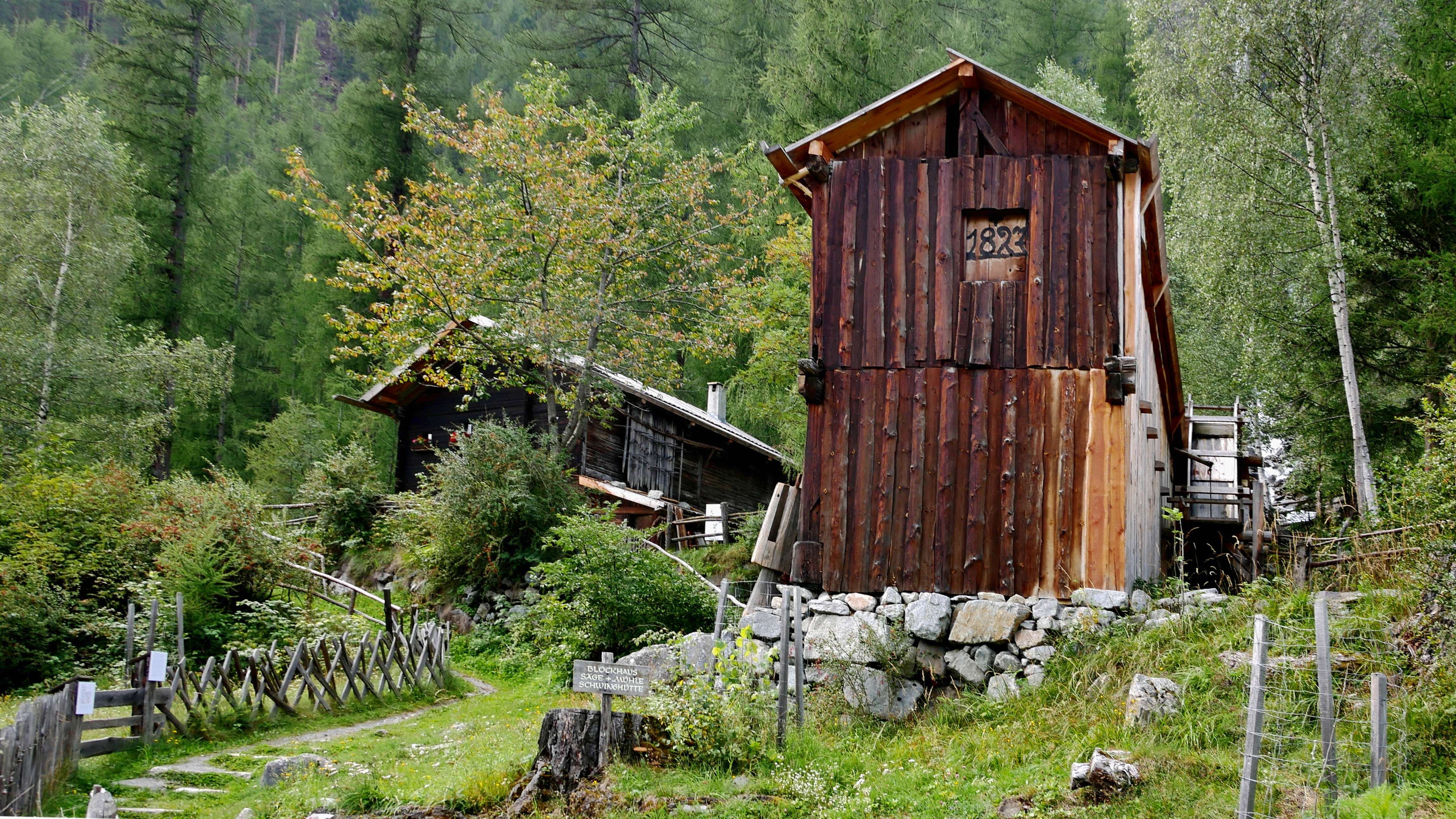 Ötztaler Freilichtmuseum, Längenfeld Ötztal/Tirol - Wassergetriebene Sägemühle